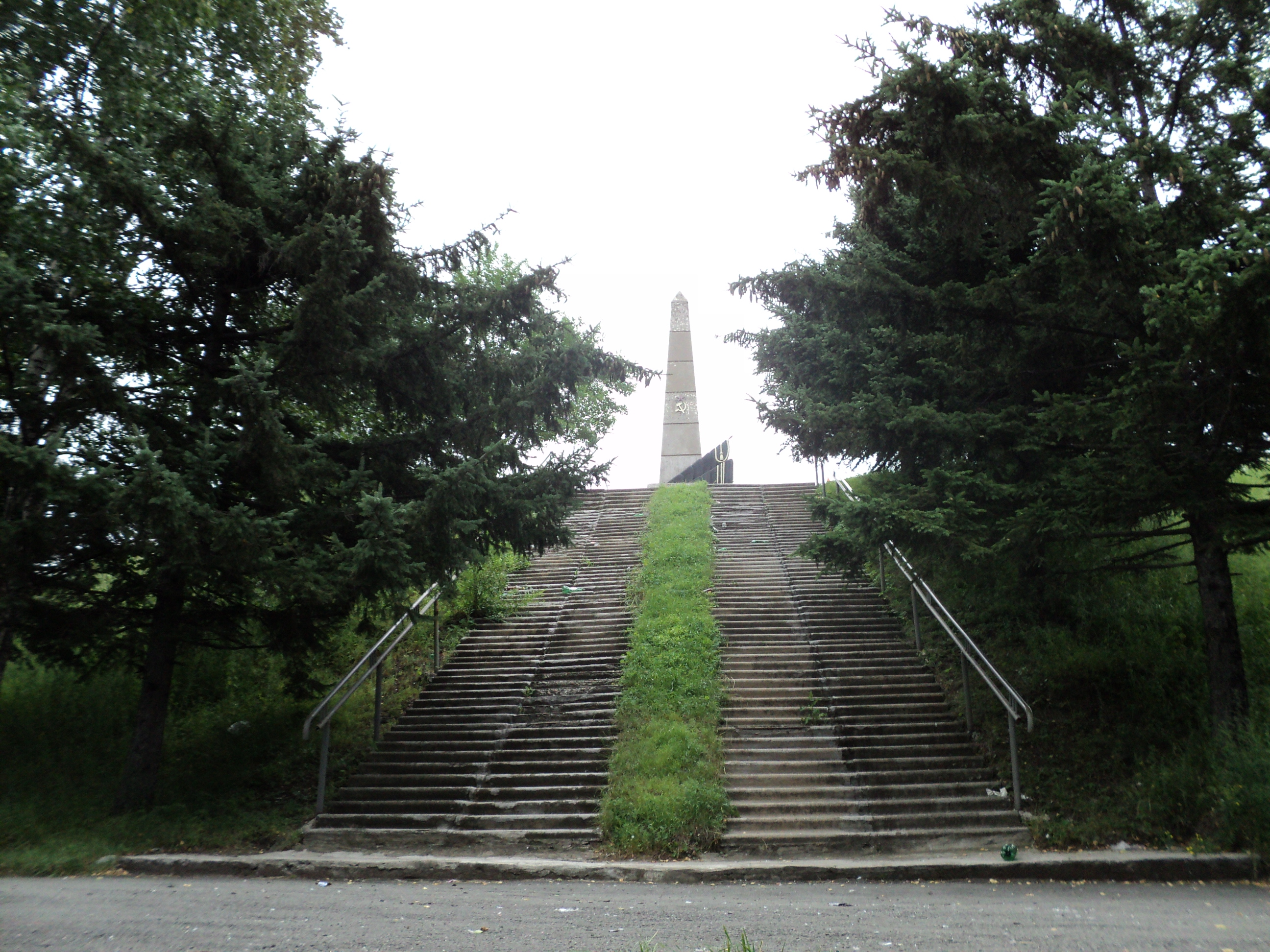 Лестница к памятнику в Партизанске